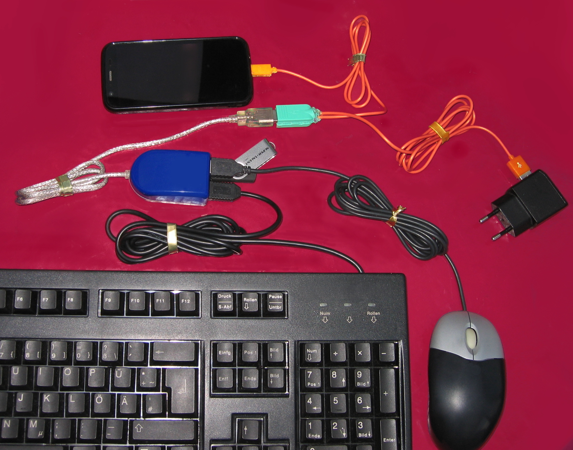 USB-OTG Aufbau